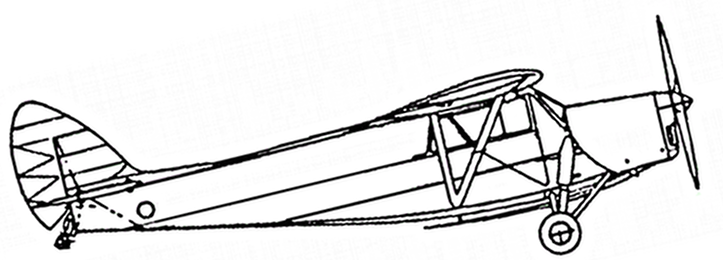 Vista laterale di un de Havilland DH.85 Leopard Moth. Disegno eseguito in GIMP partendo da vecchie cianografie.